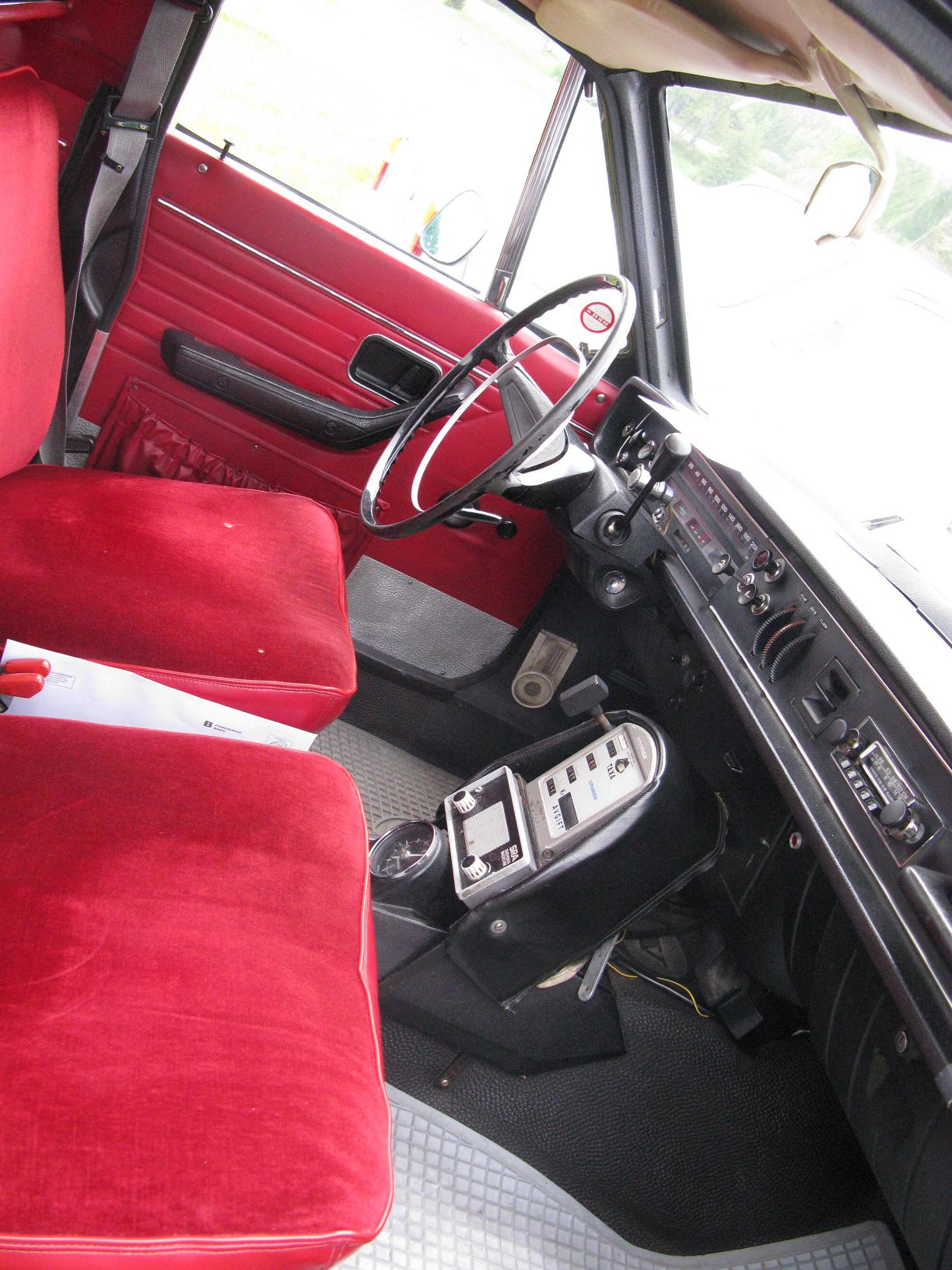 Volvo 144 Taxi